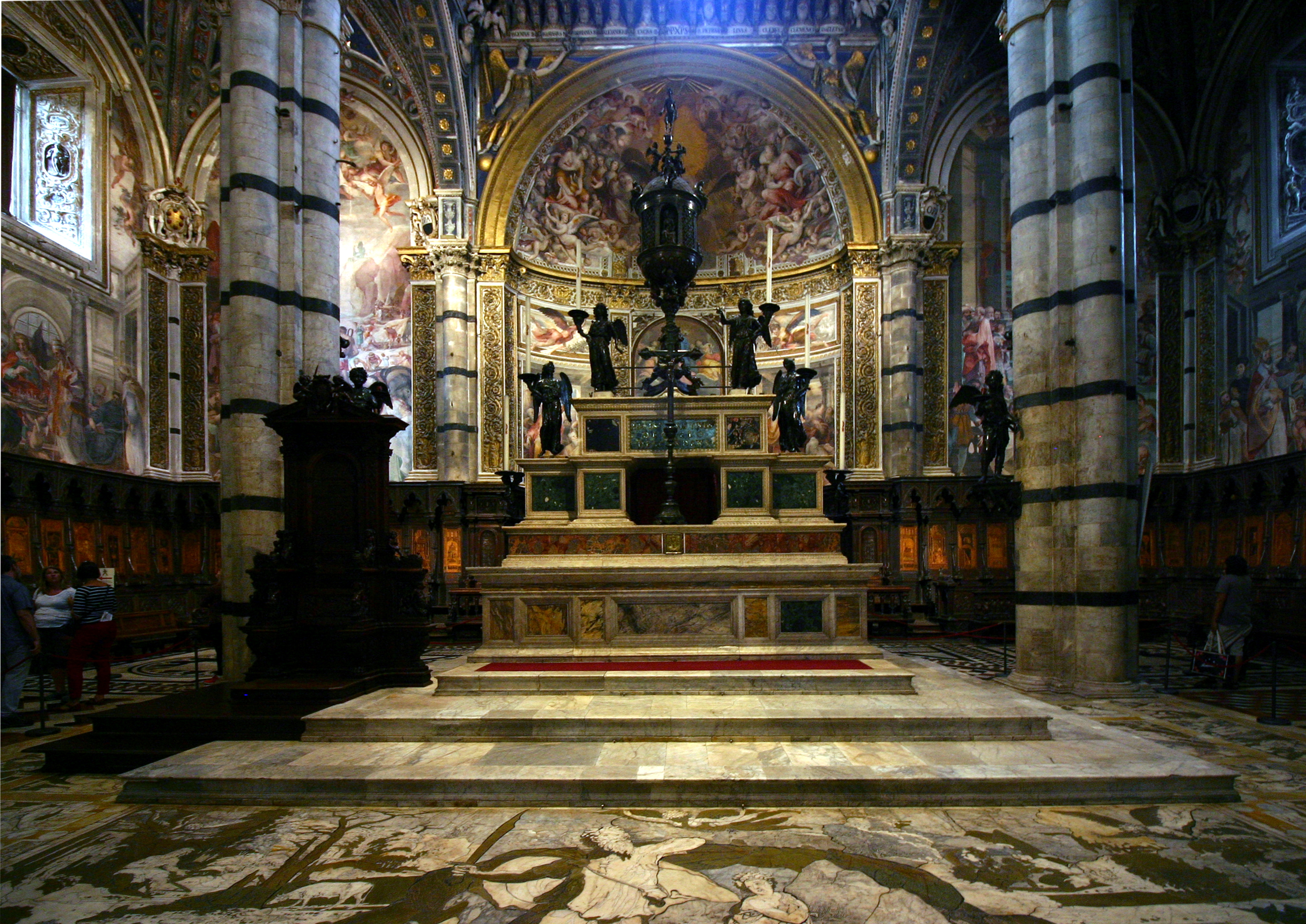 Duomo - Siena